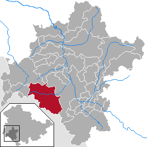 Rhönblick in Thuringia - District Schmalkalden-Meiningen